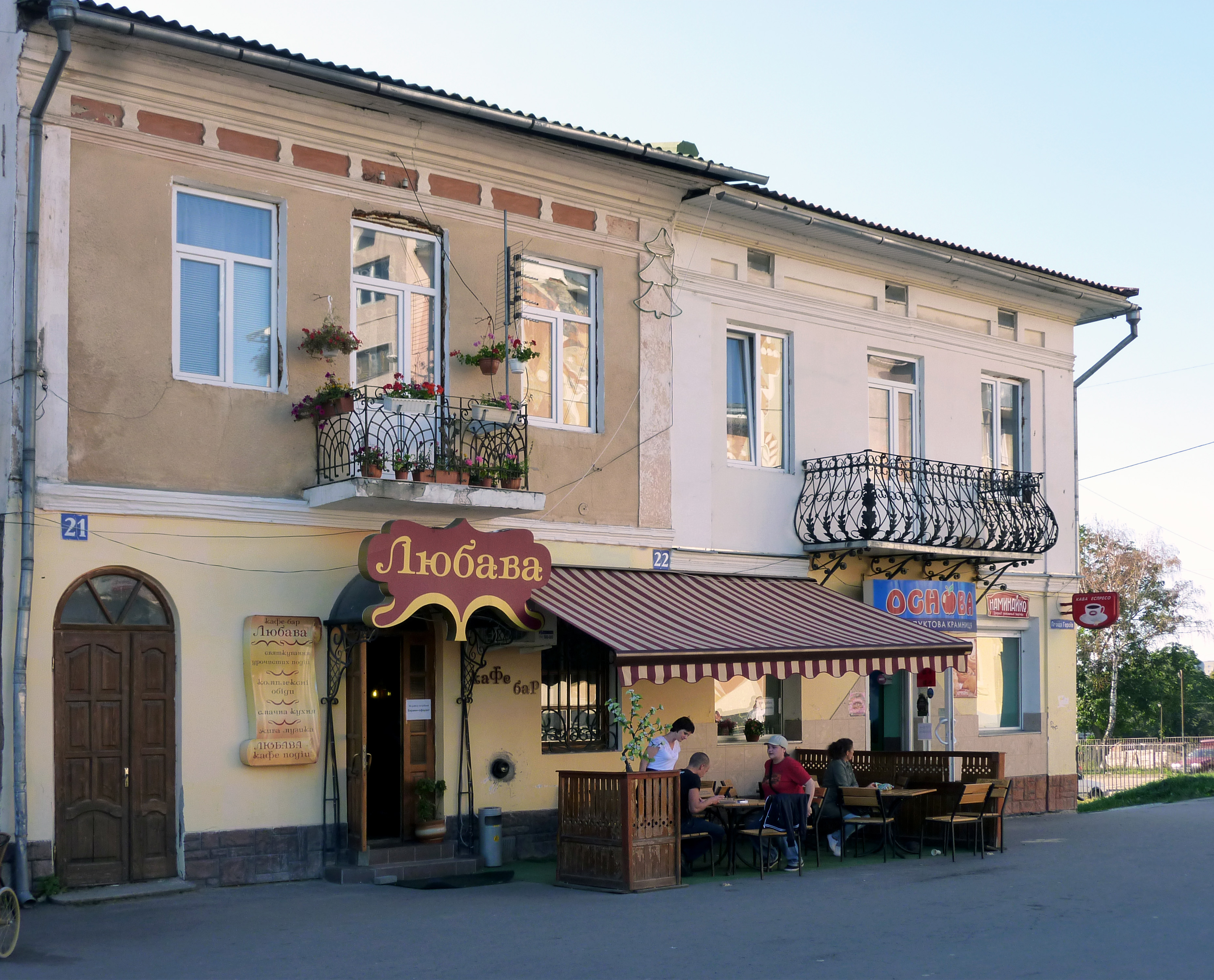 Житловий будинок ХХ ст.